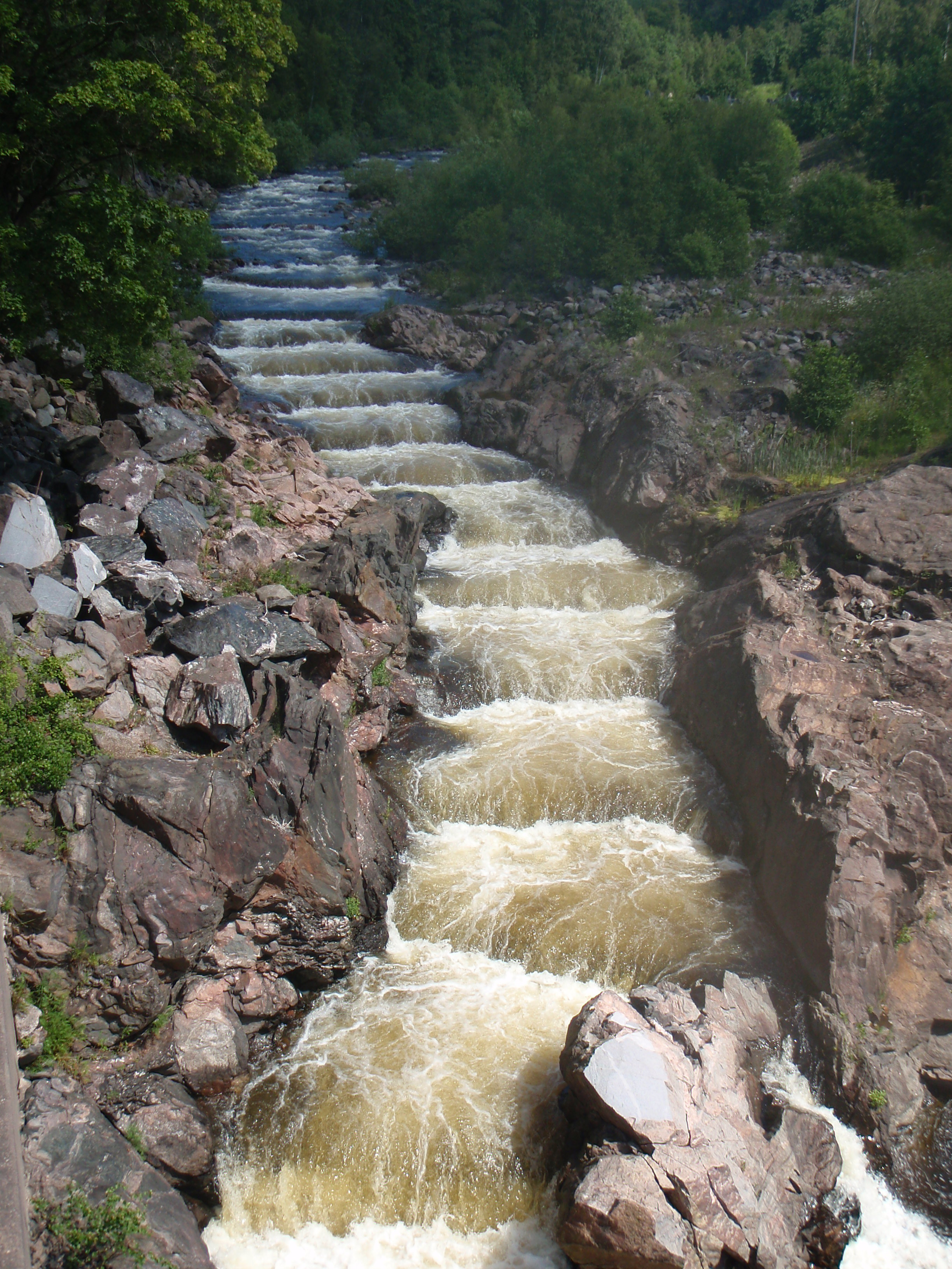 Laxtrappan utanför kraftbolaget i Gullspång